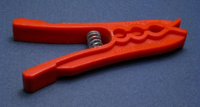 Pince à linge avec ressort